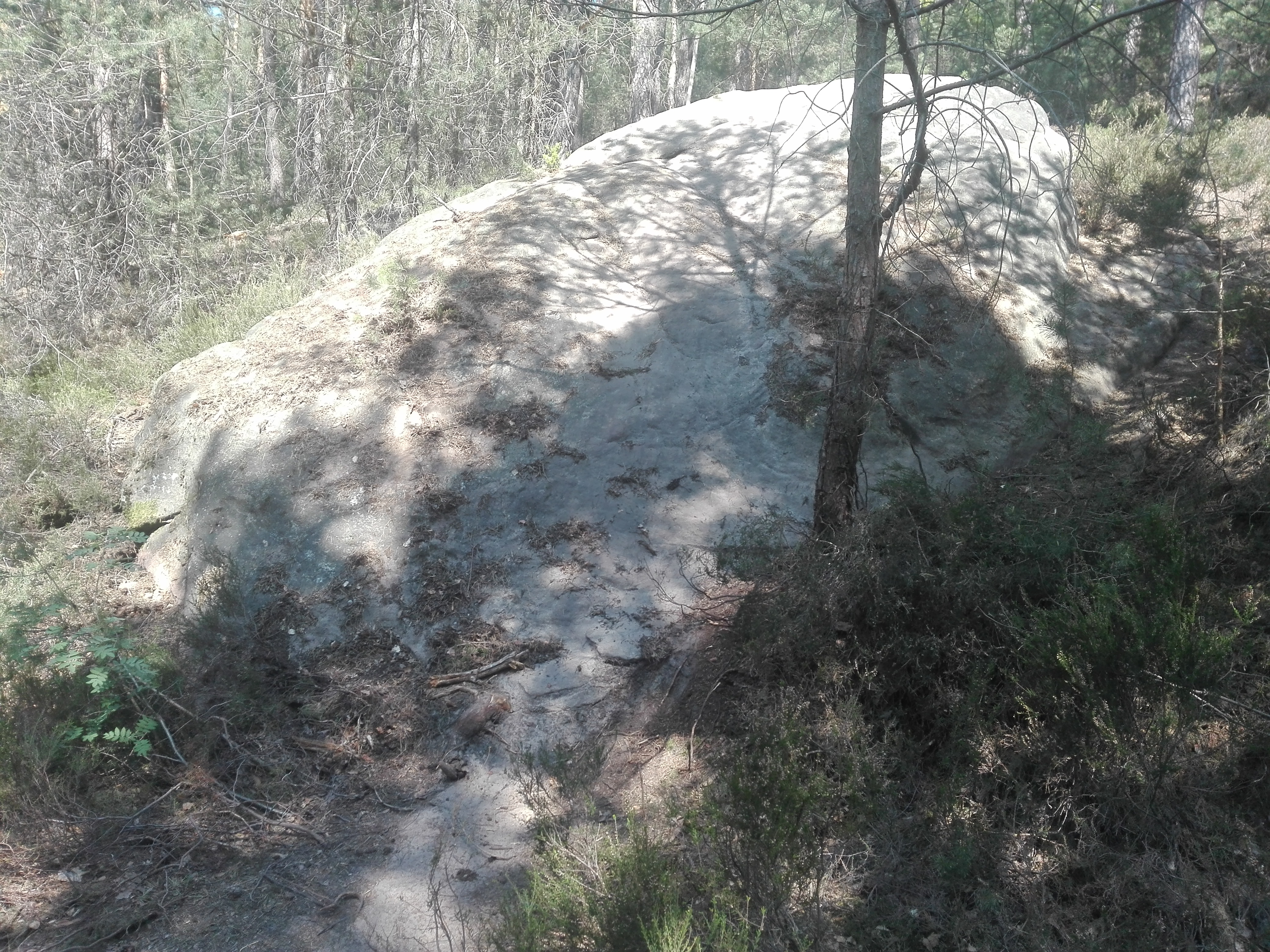 Schwehrstein am Südhang des Stabenbergs, Ansicht von Süden vom Fahrweg